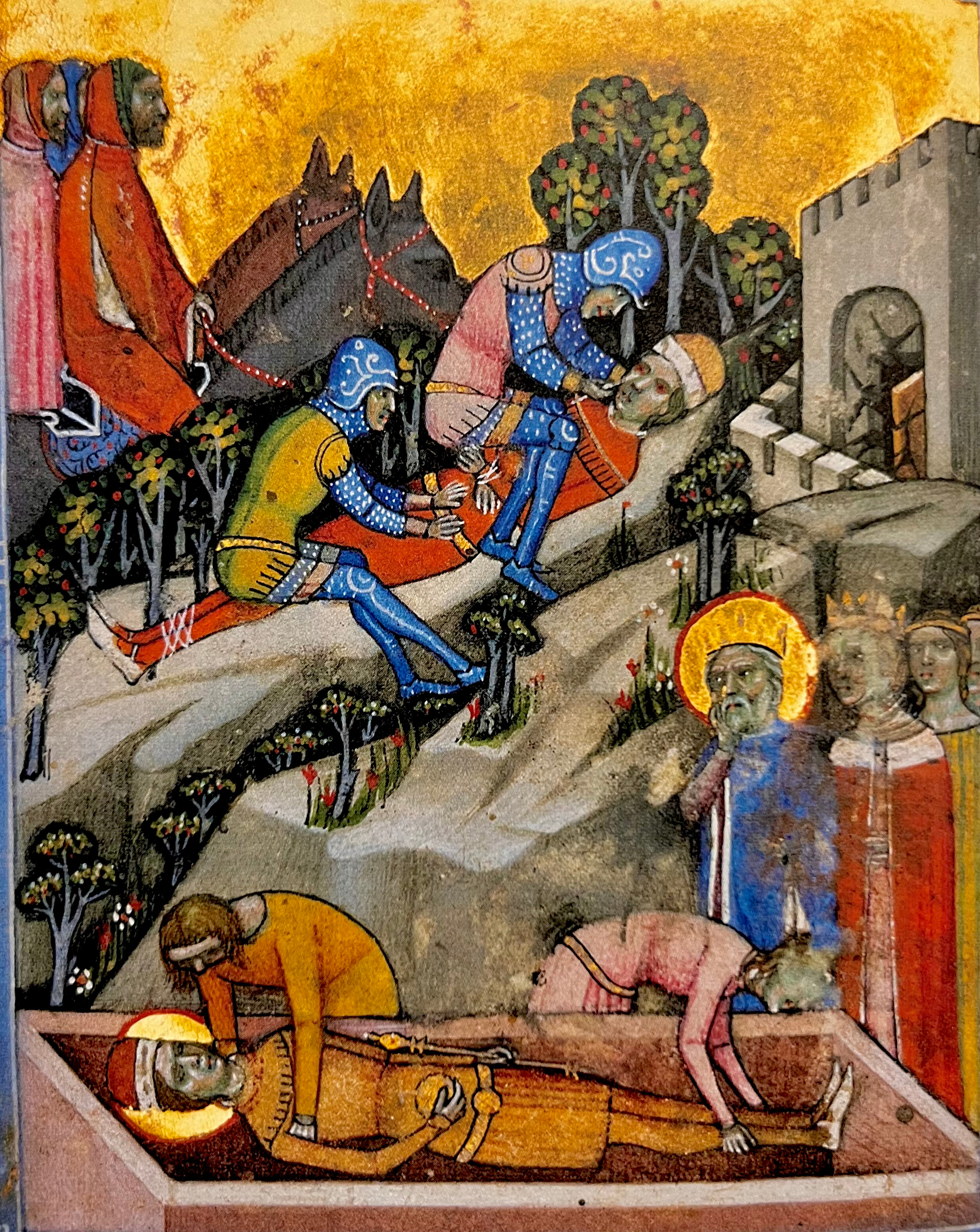 Stephen I at the funeral of his son (below) and blinding of Vazul (above)